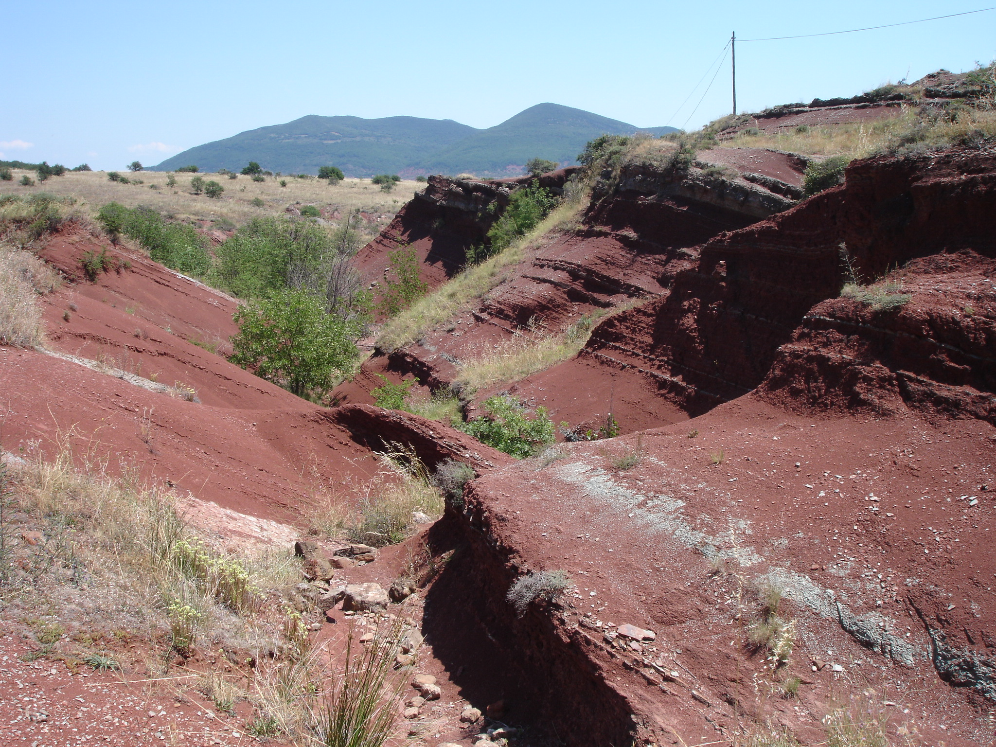 Argilite au Bassin de Lodève en France dans l'Hérault (34), la Lieude, Mérifons. Argile rouge avec du fer oxydé, argile bleu vert avec du fer